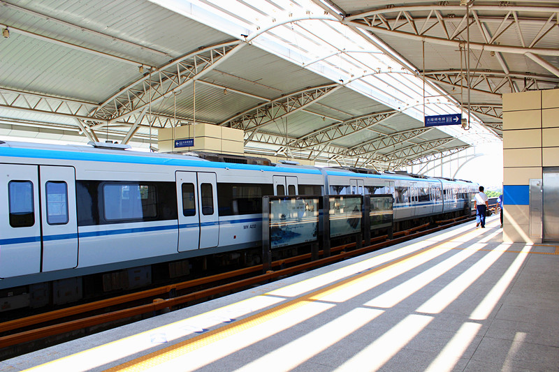 中文（中国大陆）: 武汉地铁1号线